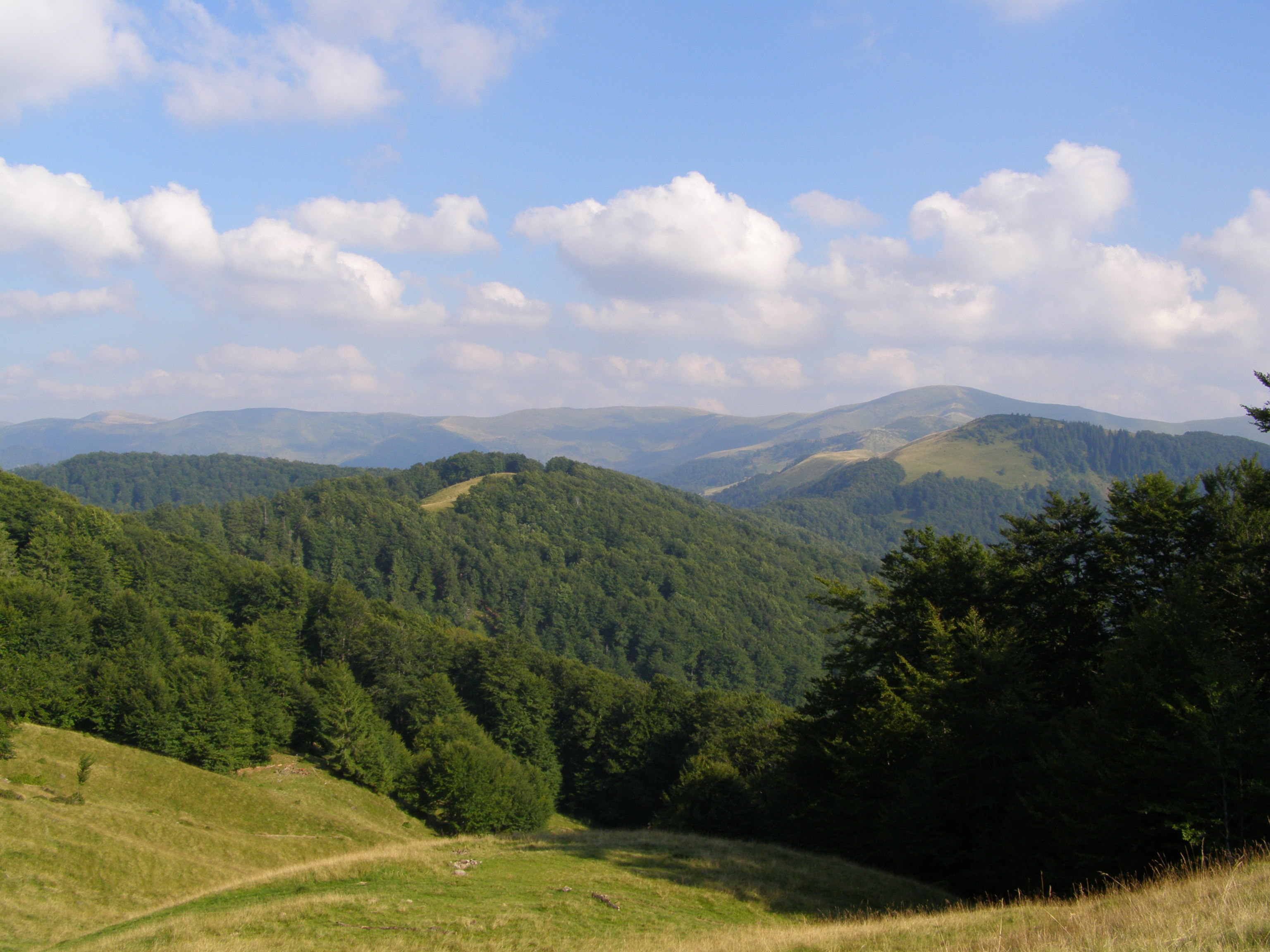 Svydovec, v pozadí vpravo vrchol Tempa (1634 m) a hřeben vedoucí na východ, pohled od severu